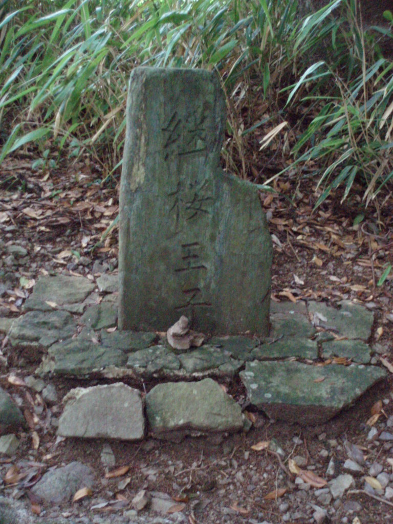 Monument_TSUGIZAKURA-oji_remains